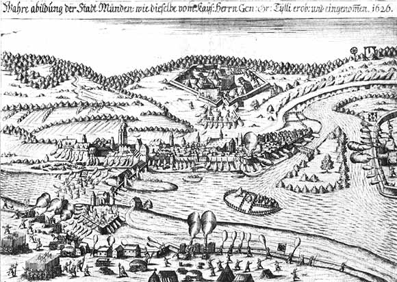 Tillys Einnahme von Münden 1626